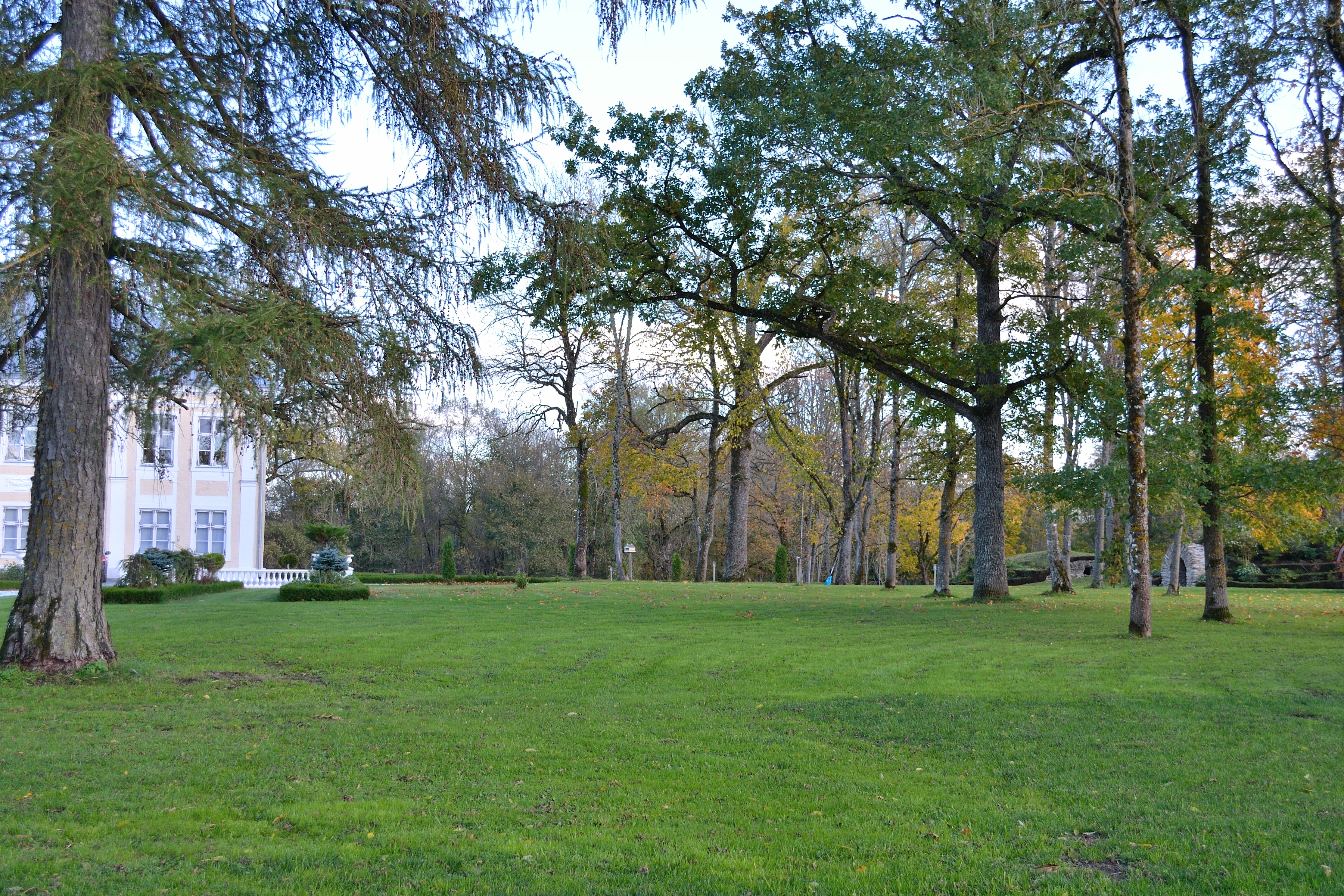 Ääsmäe mõisa park, 18.-20.sajand